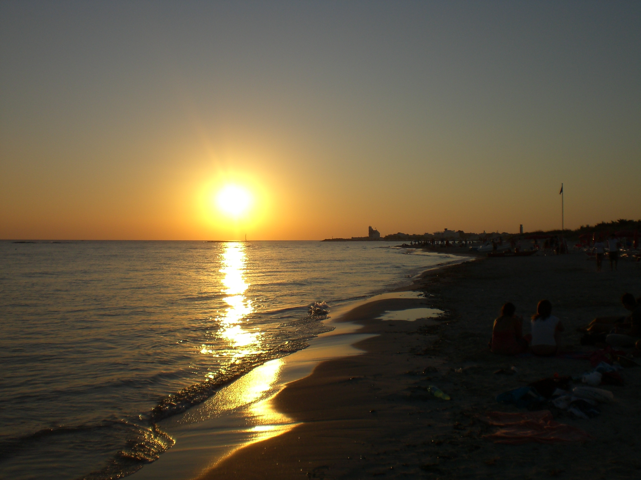 tramonto sul mare a Torre San Giovanni (Ugento) - provincia di Lecce